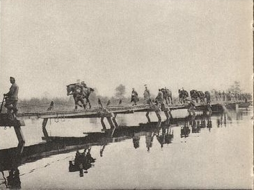 1 Pułk Ułanów Legionów Polskich podczas przejścia przez Bug.